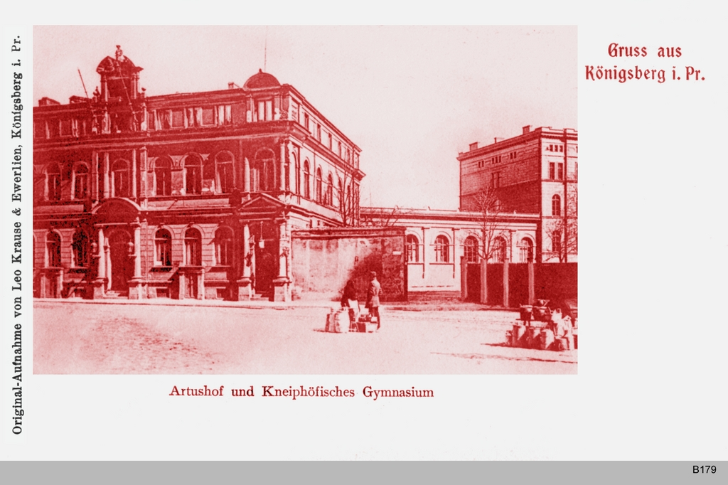 Königsberg